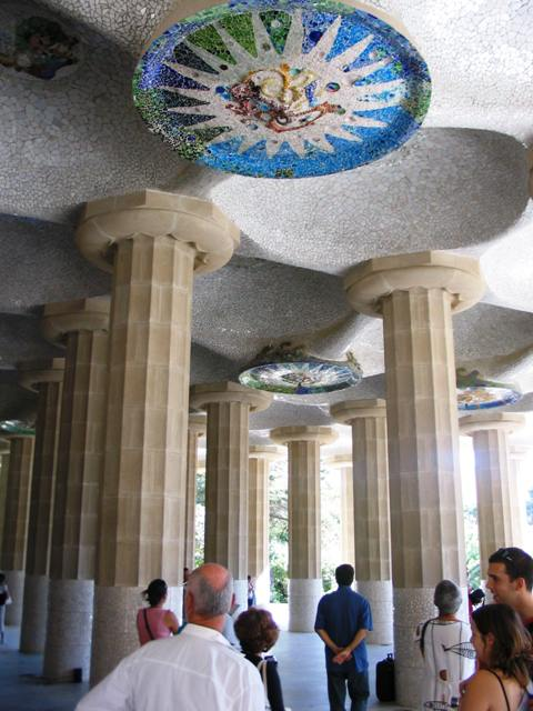 Barcellona, parc guell